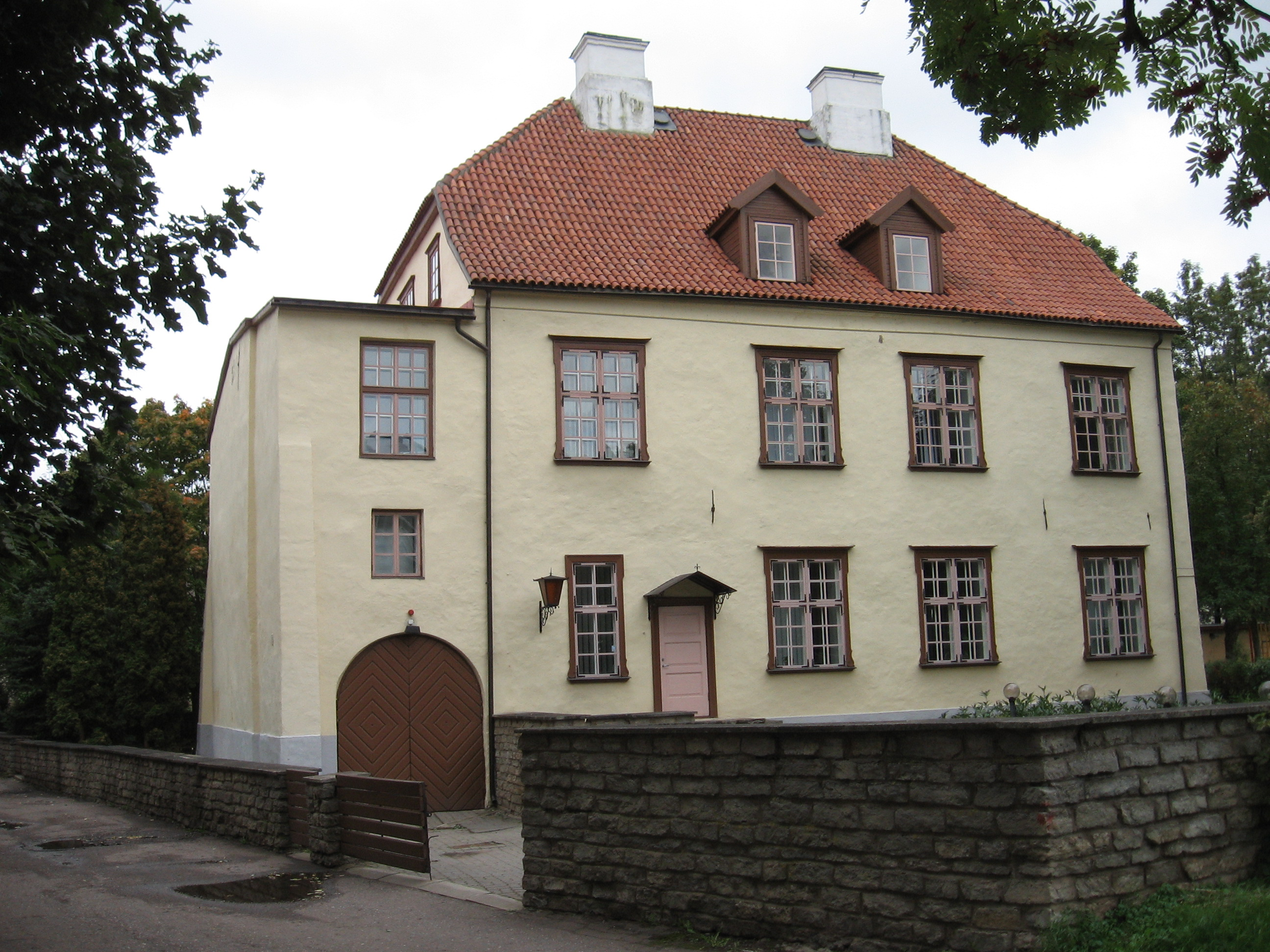 Elamu Narvas Koidula tn 3a